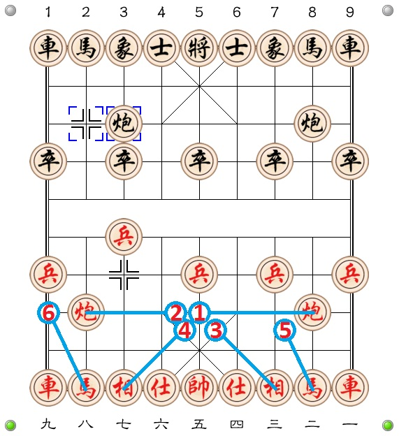 Tiên nhân chỉ lộ đối tốt để pháo